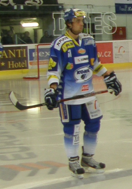 Jakub Svoboda (* 1989) v dresu Komety Brno v zápase proti Plzni